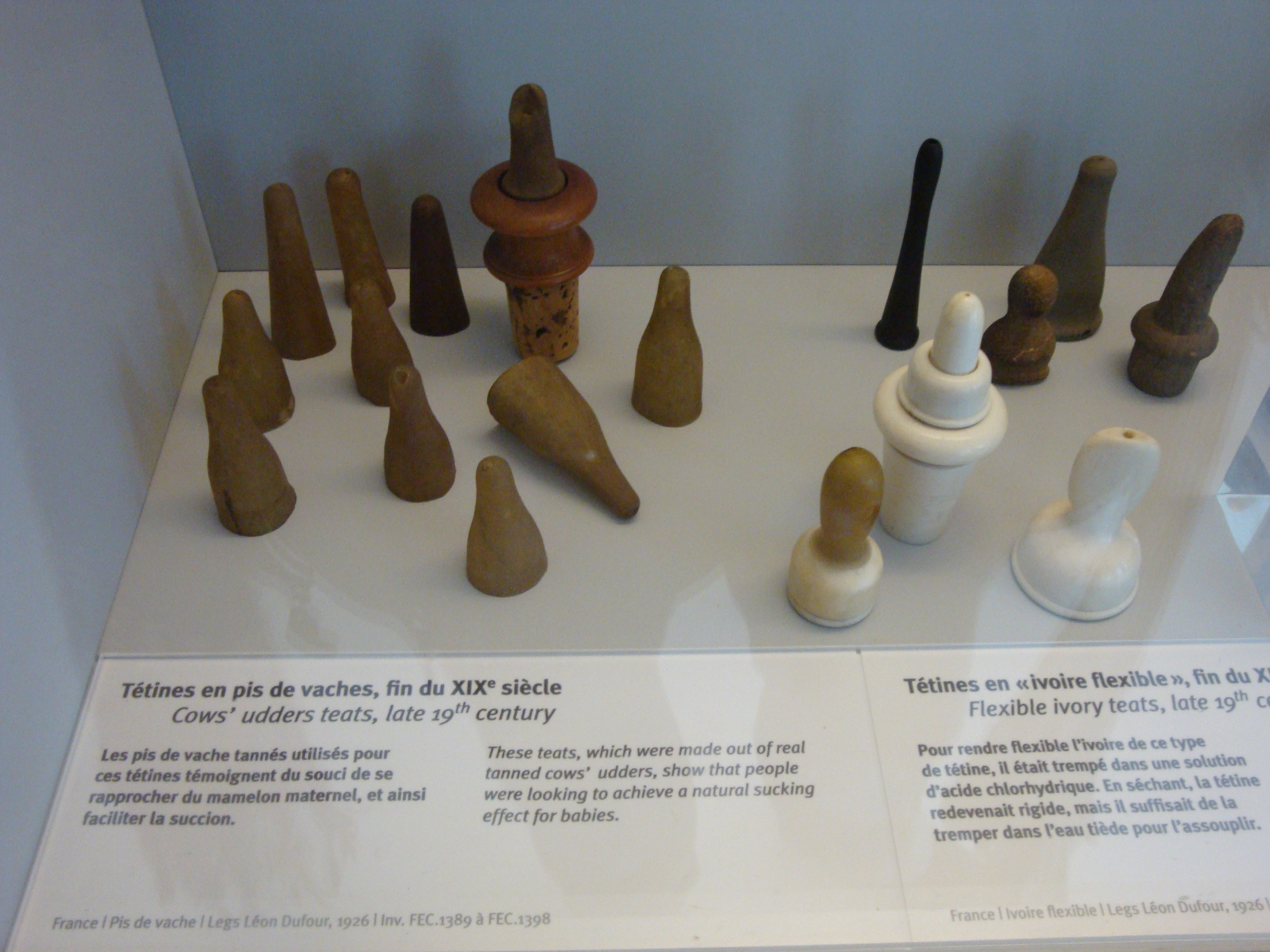 Collection de tétines en pie de vache - Musée des Pêcheries de Fécamp - La Goutte de lait de Léon Dufour